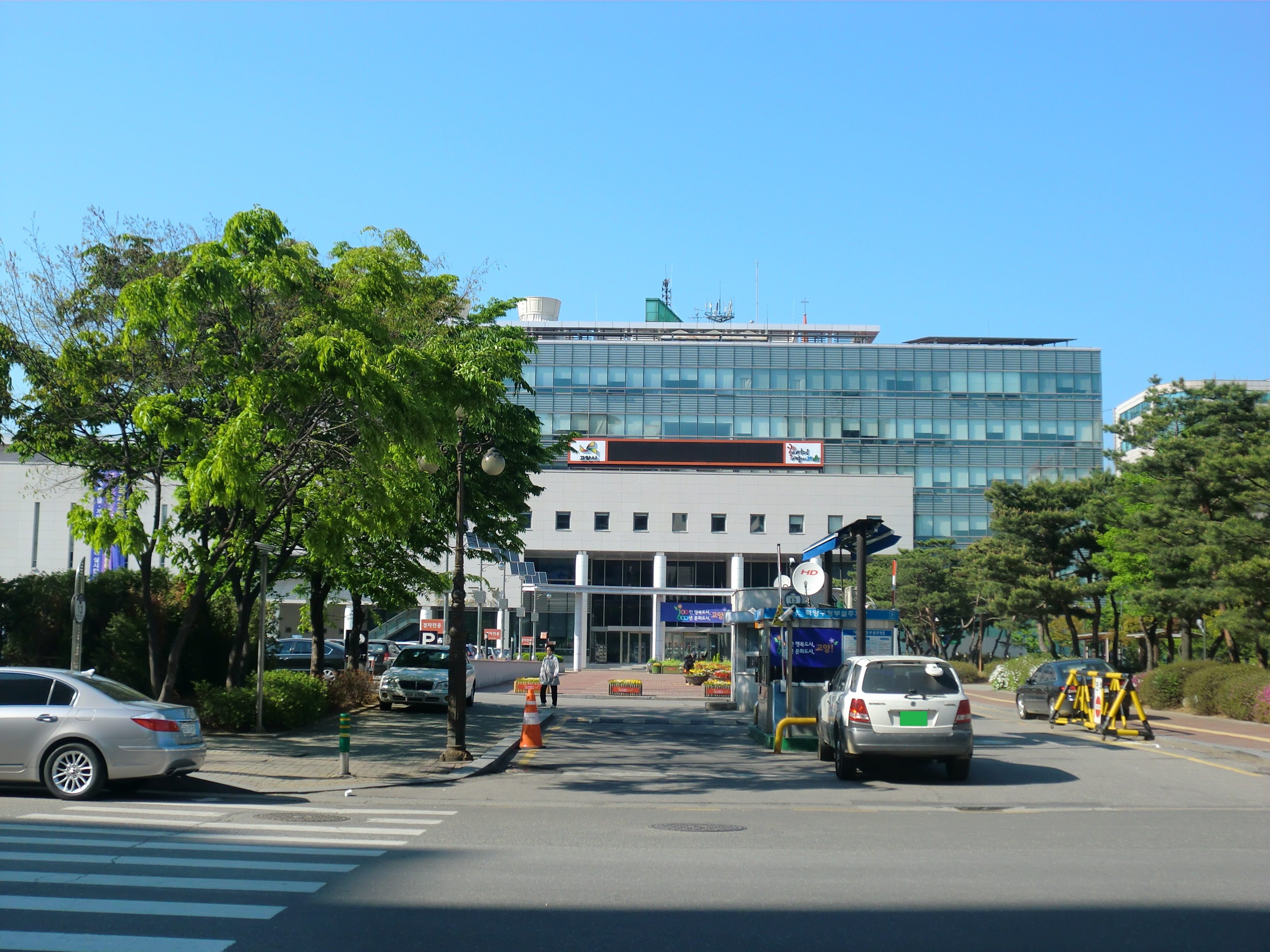 경기도 고양시에 있는 덕양구청